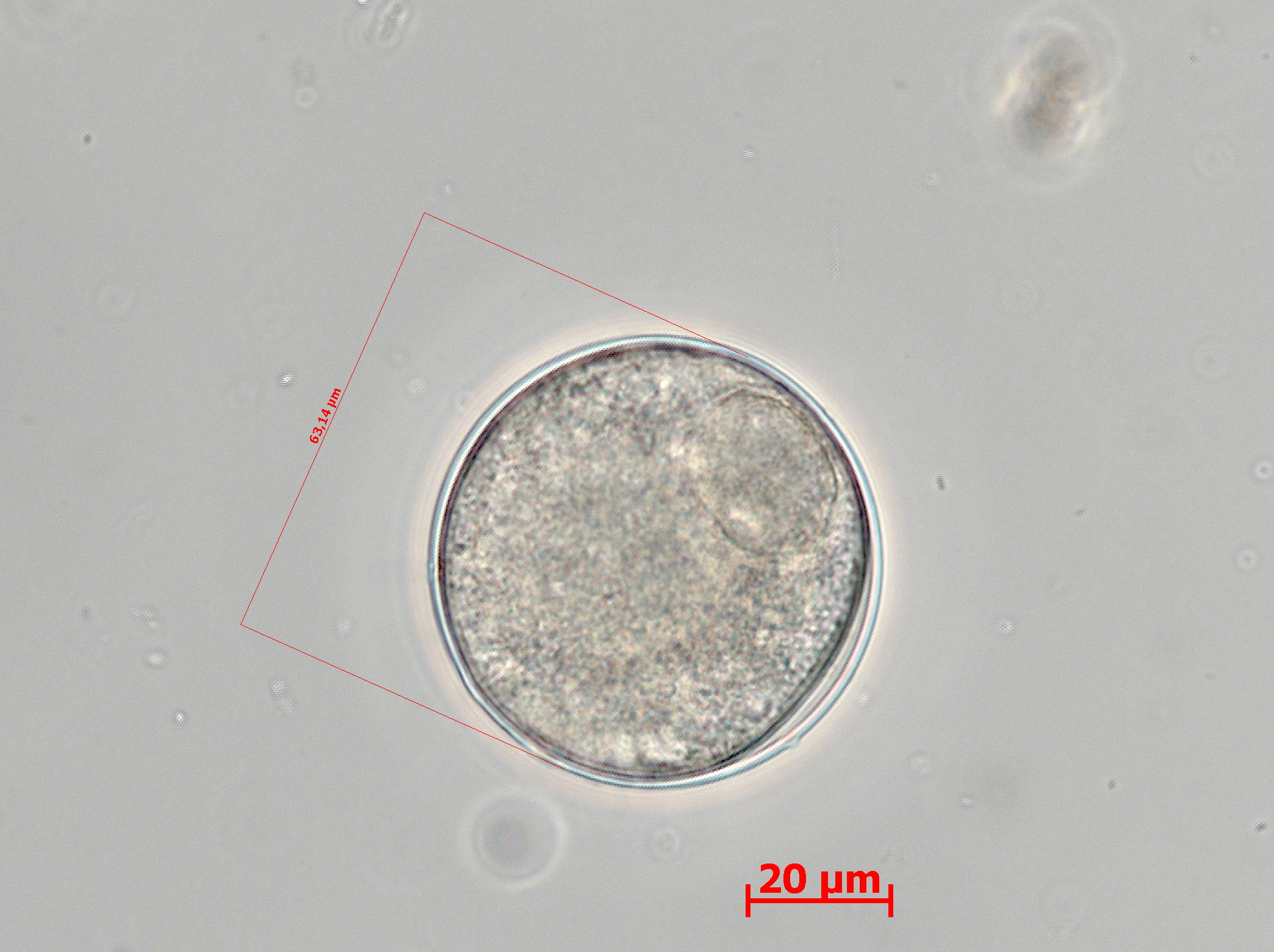 Фото цисты Buxtonella sulcata от крупного рогатого скота